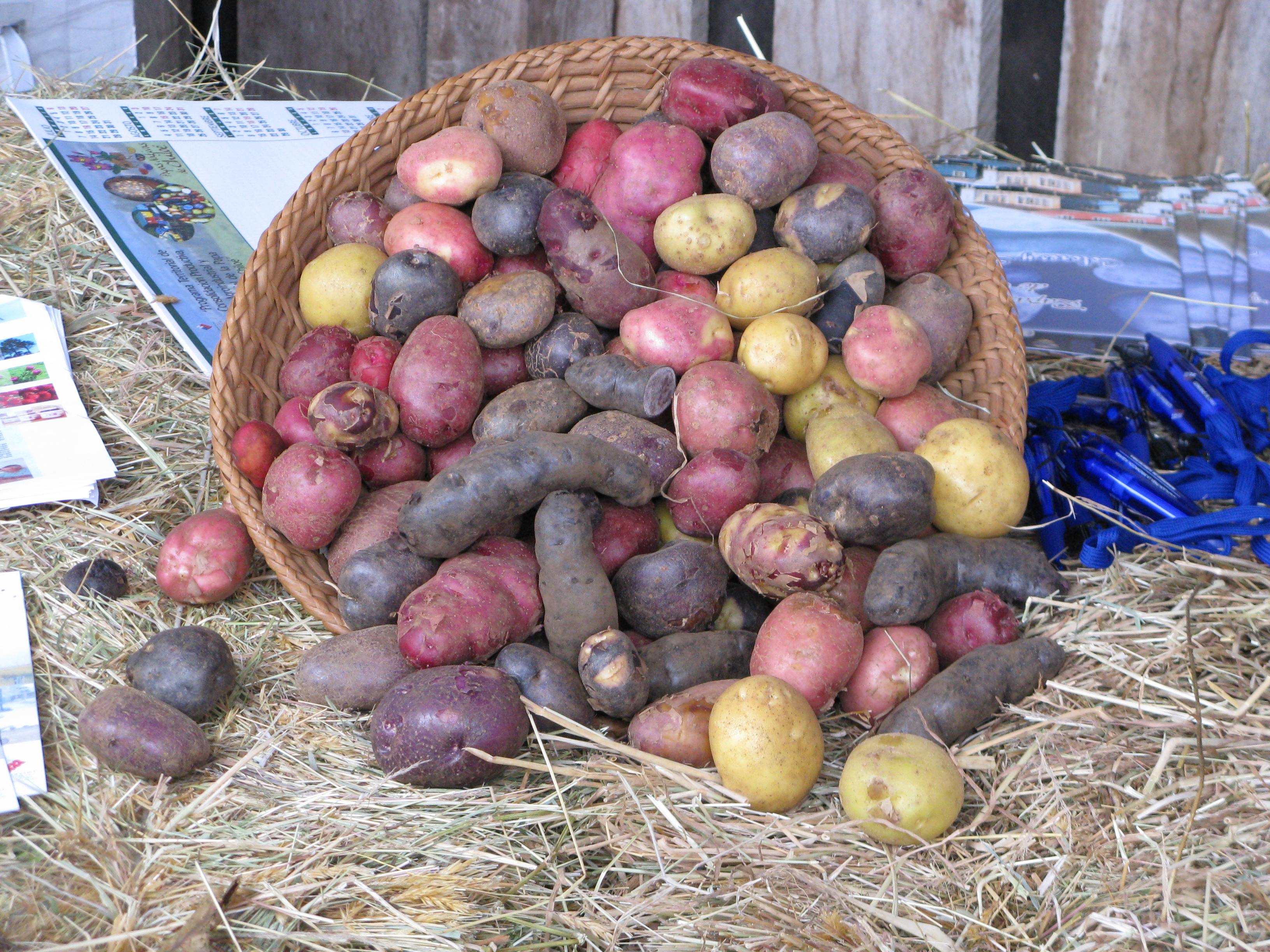 Pommes de terre colorées de Chiloe (Chili). Photo prise à Castro, Los lagos